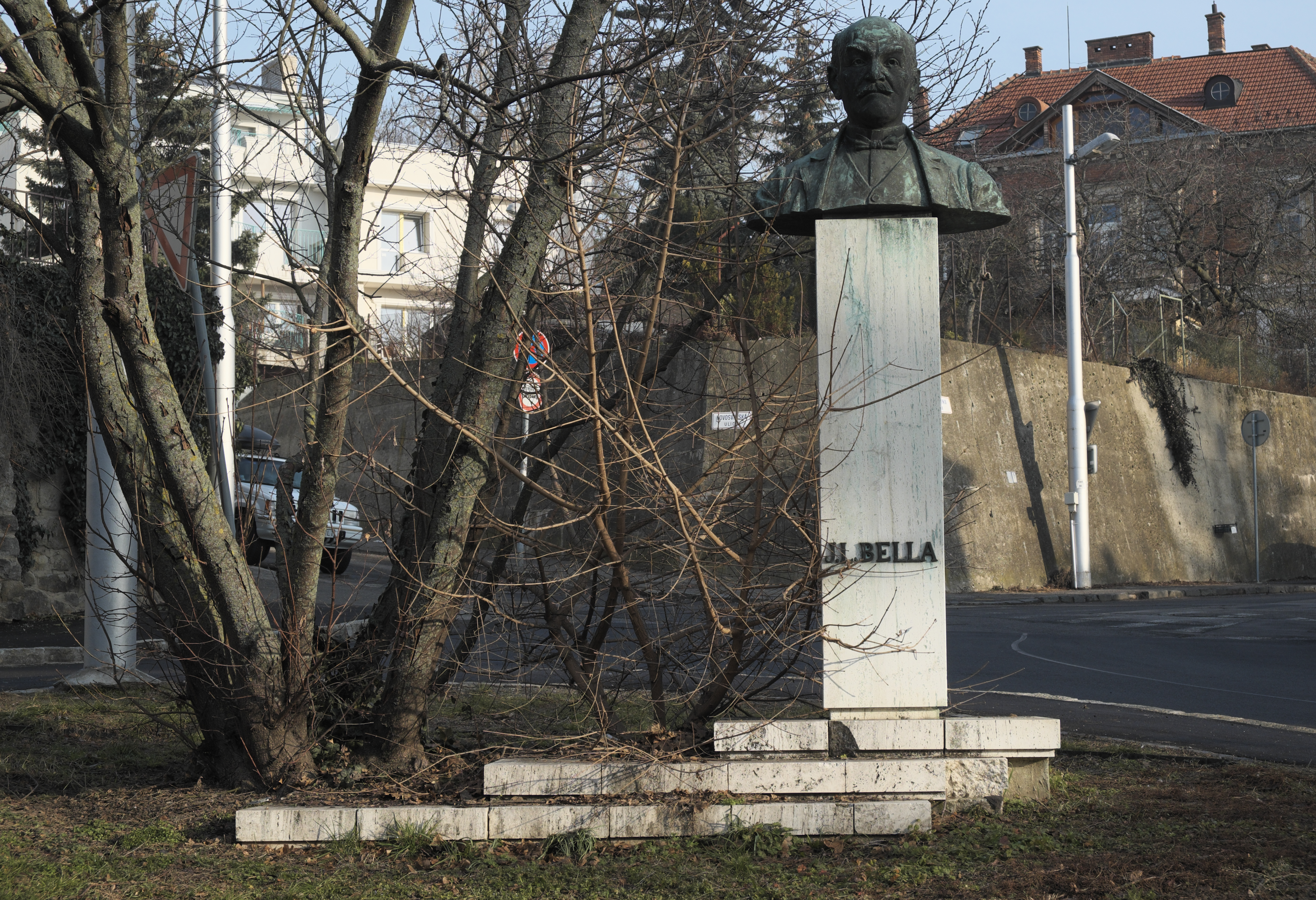 Denkmal für Ján Levoslav Bella, Šulekova, in Bratislava (Slowakei)